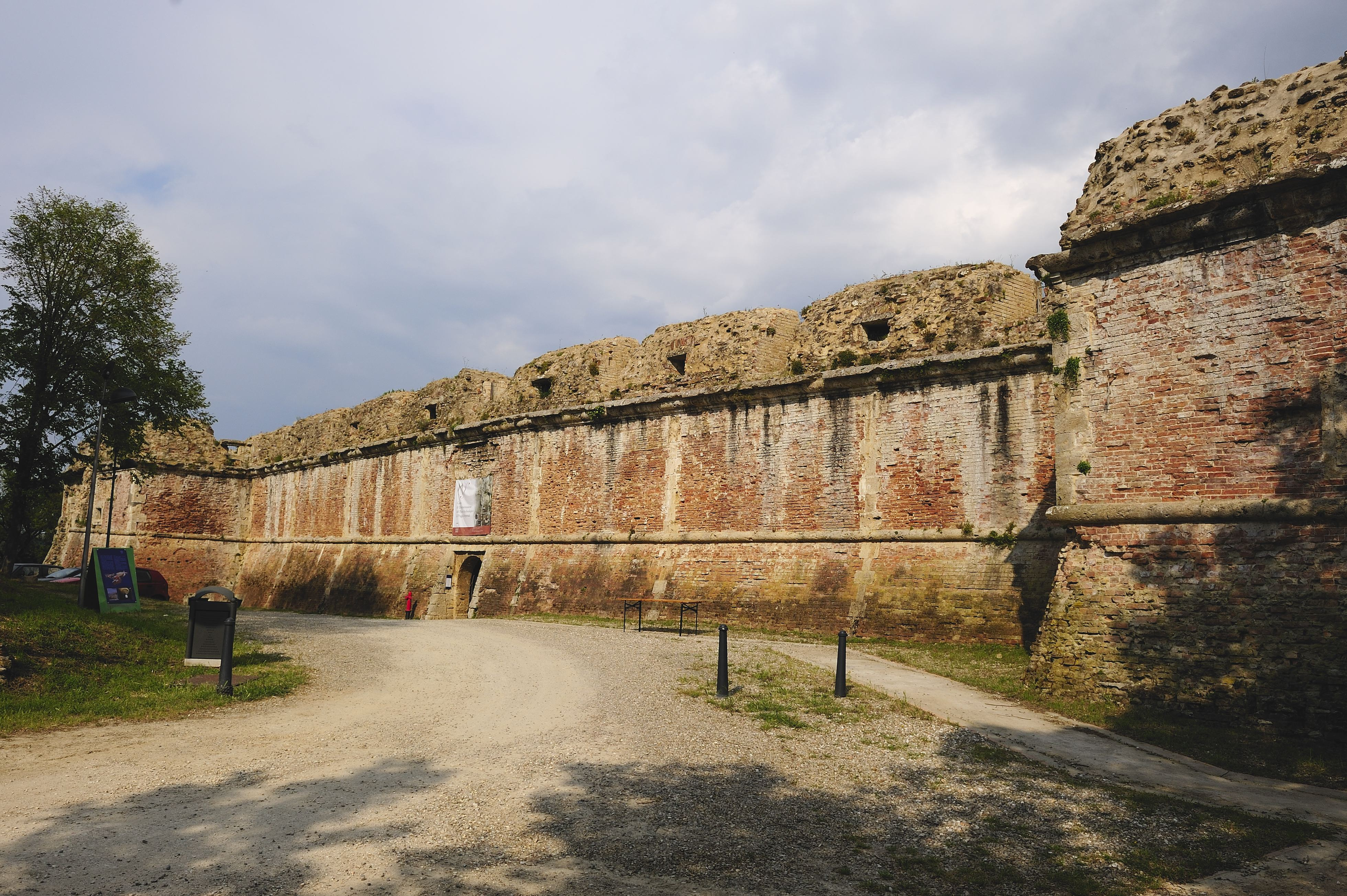 Fortezza medicea di Poggio Imperiale, ingresso - Poggibonsi - Siena